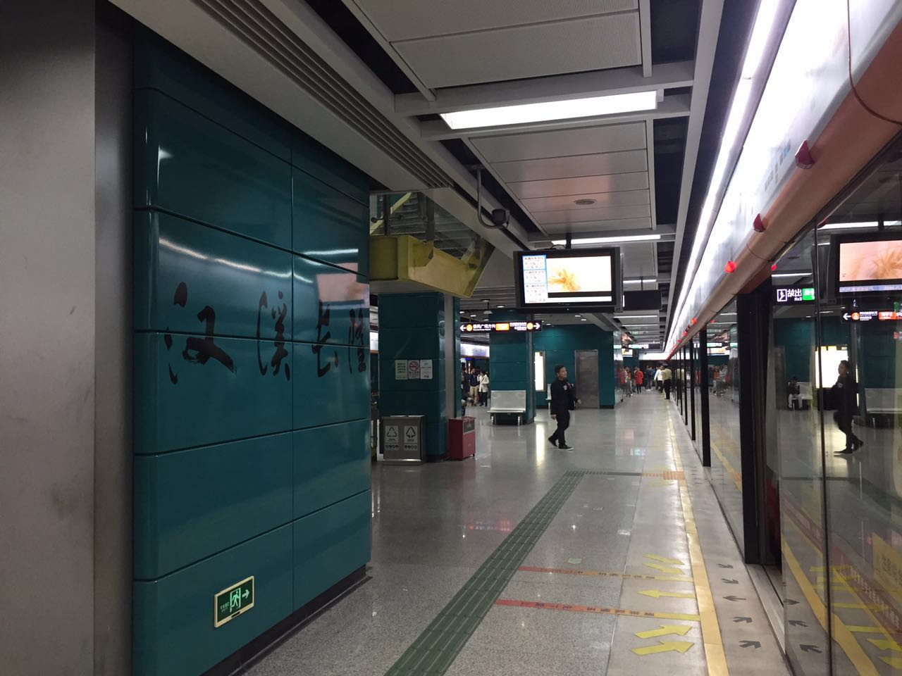 广州地铁汉溪长隆站